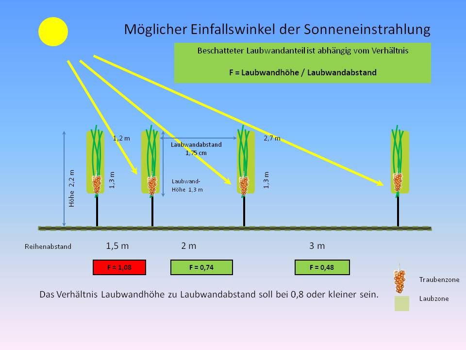 Möglicher Einstrahlungswinkel bei verschiedenen Laubwandabständen